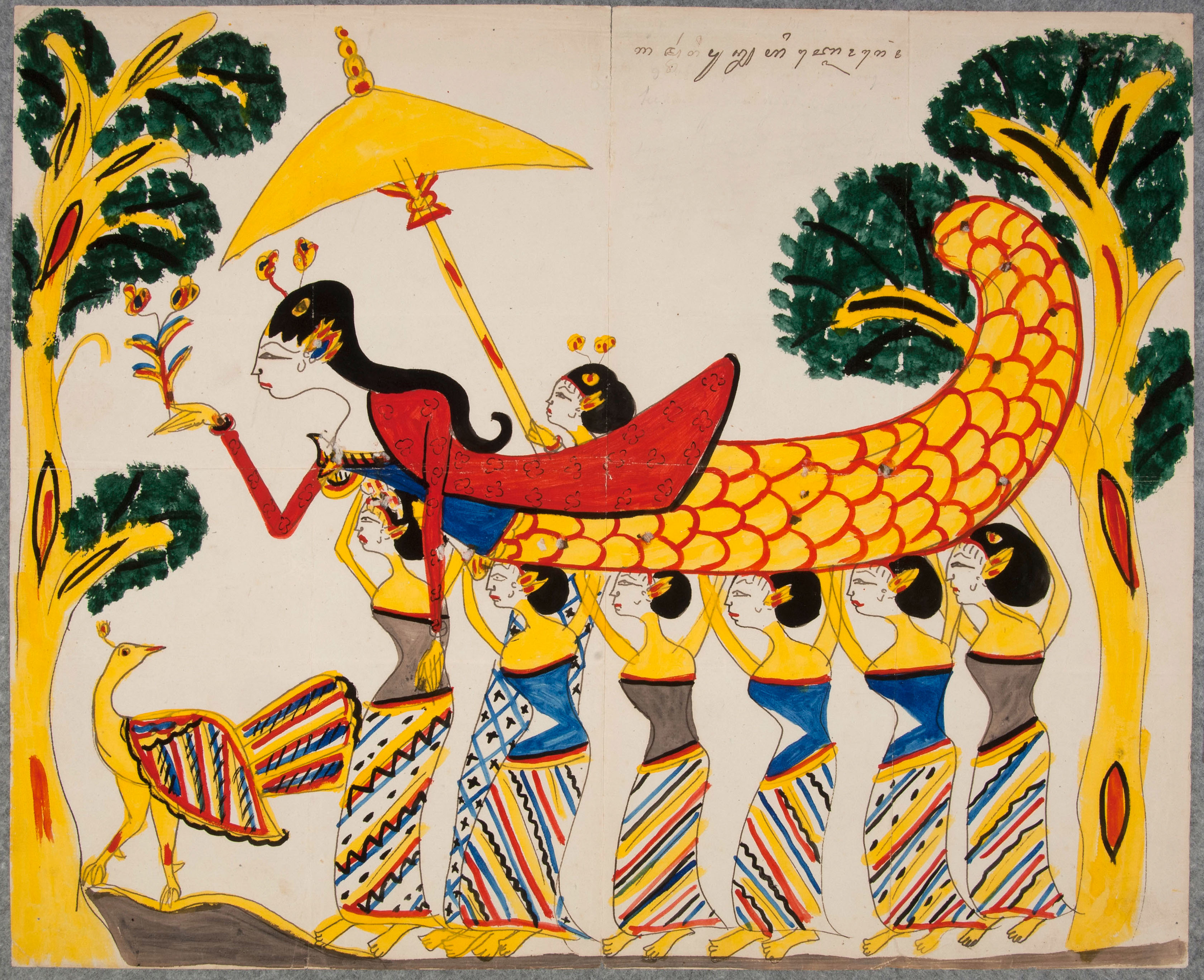 De godin van de Zuidzee wordt op Java vereerd